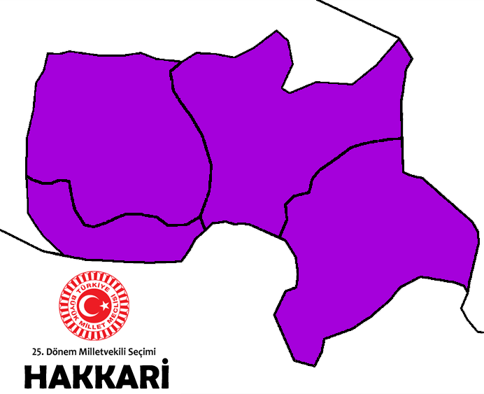 2015 genel seçim sonuçları